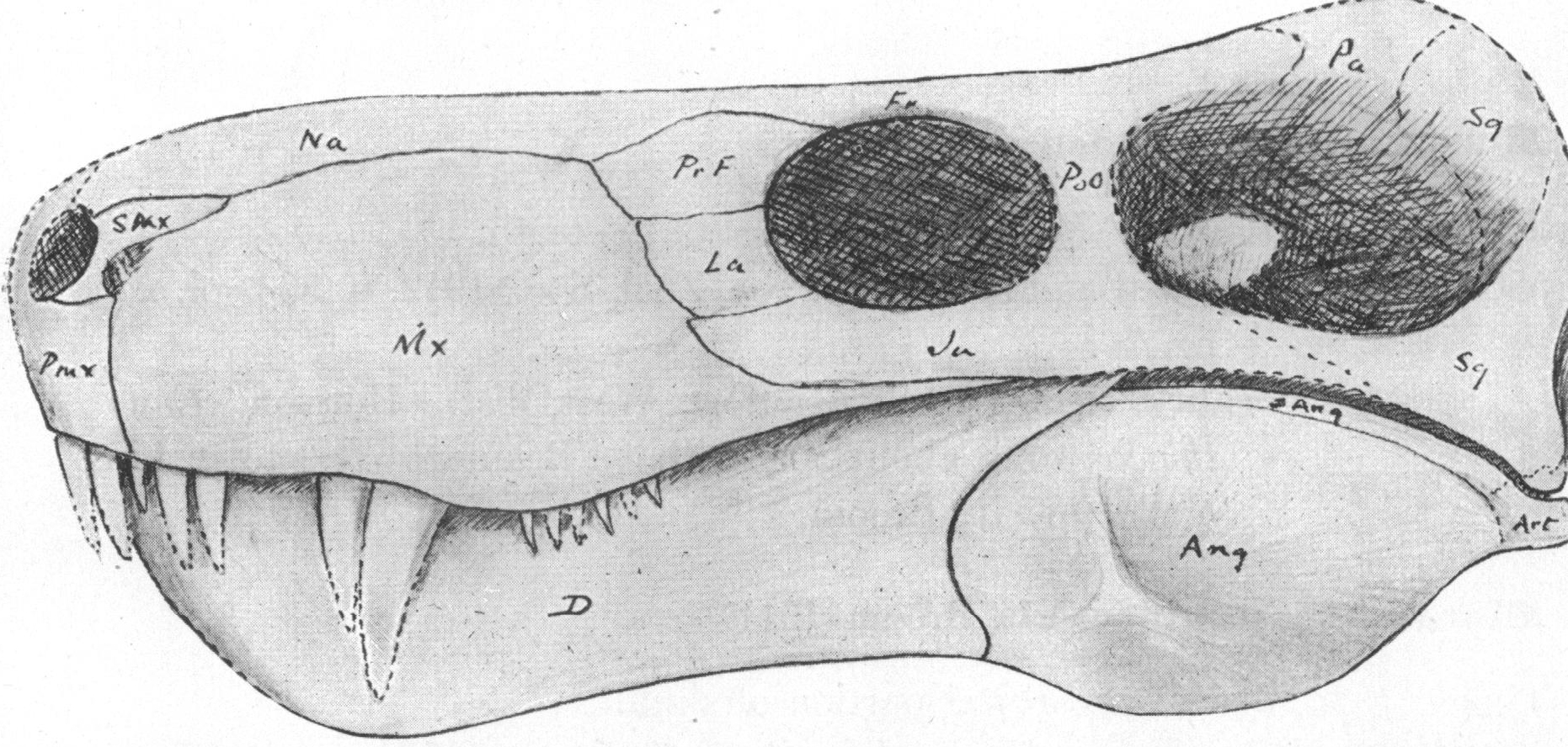 Aloposaurus gracilis skull restoration, specimen 5317